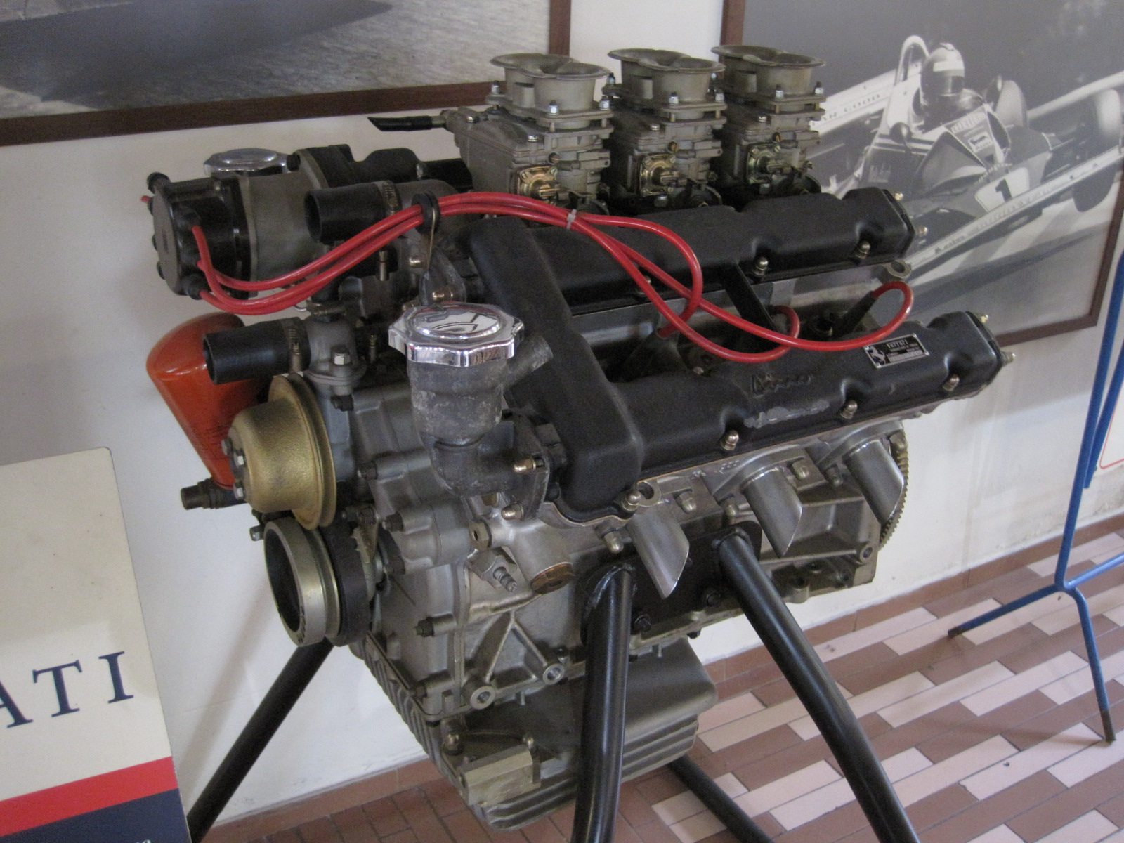 Automobiles in Panini Maserati Museum in Modène